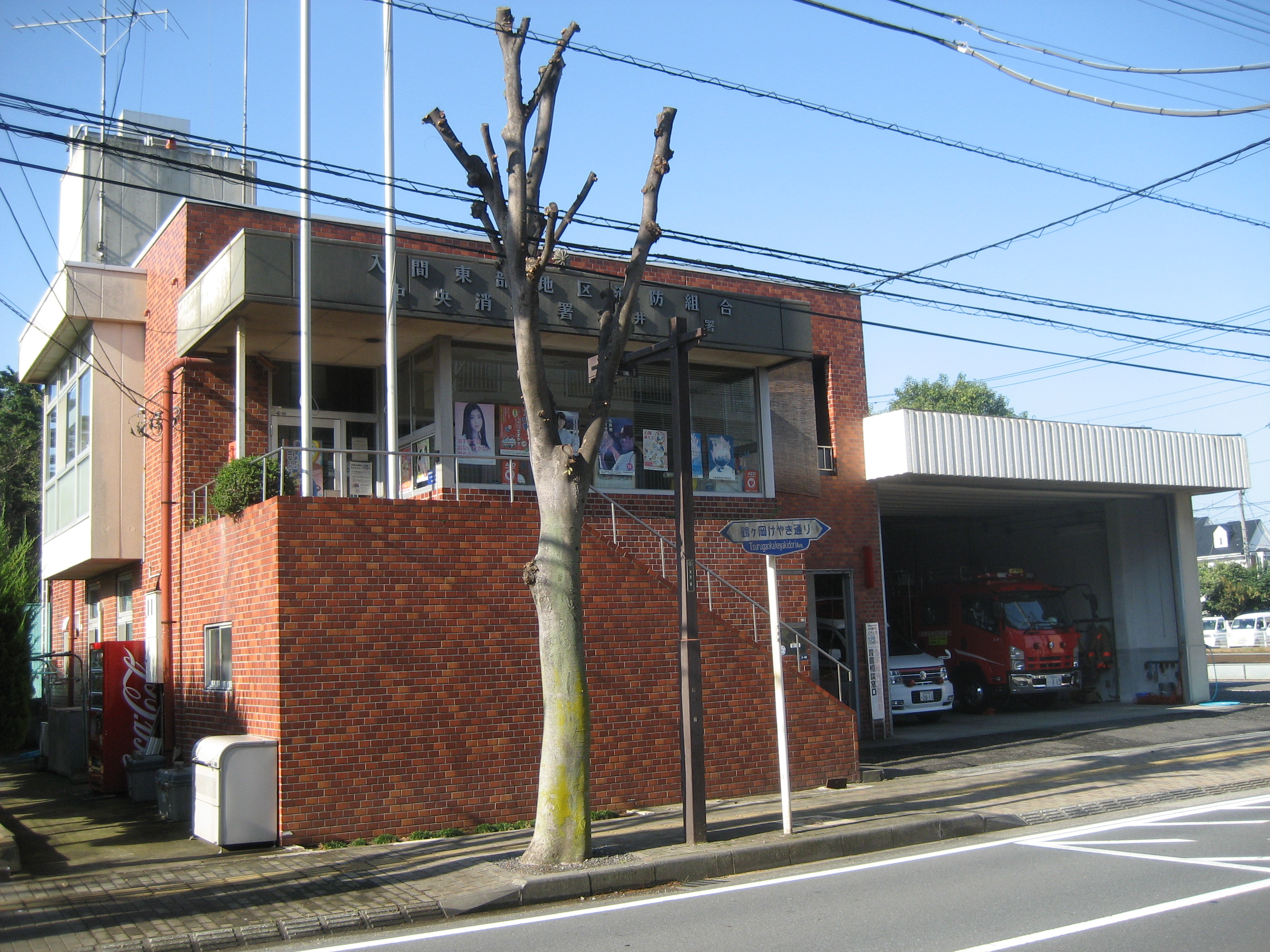 入間東部地区消防組合中央消防署大井分署庁舎（南側から撮影）